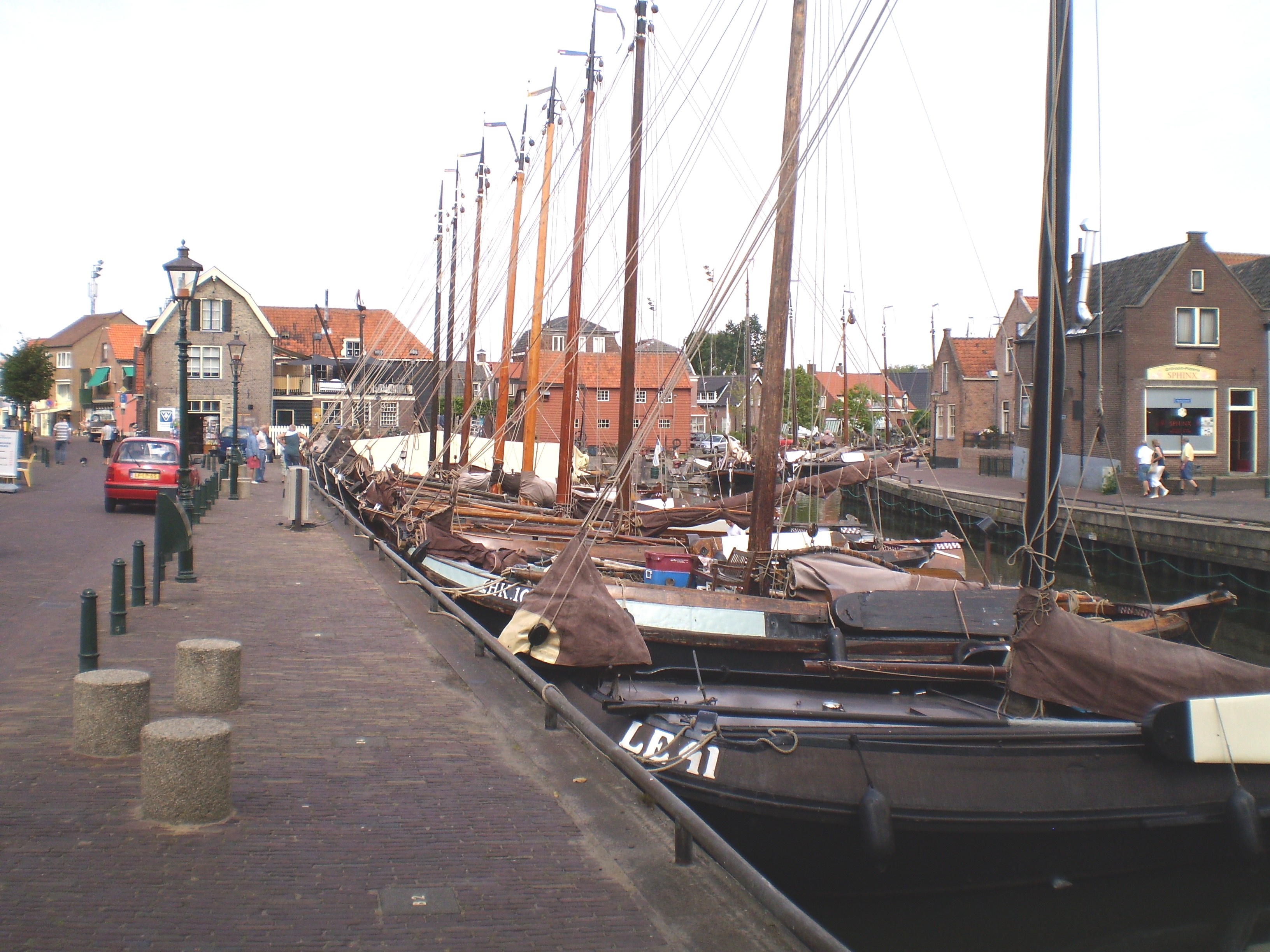 Ofbyld oanbean troch Swarte Kees op 20 augustus 2009